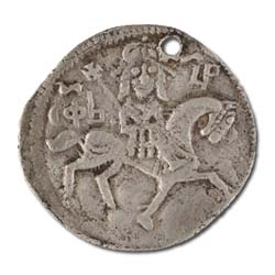 Medieval coin (царски динар/imperial dinar) of Emperor Stefan Dušan (r. 1331-1355)